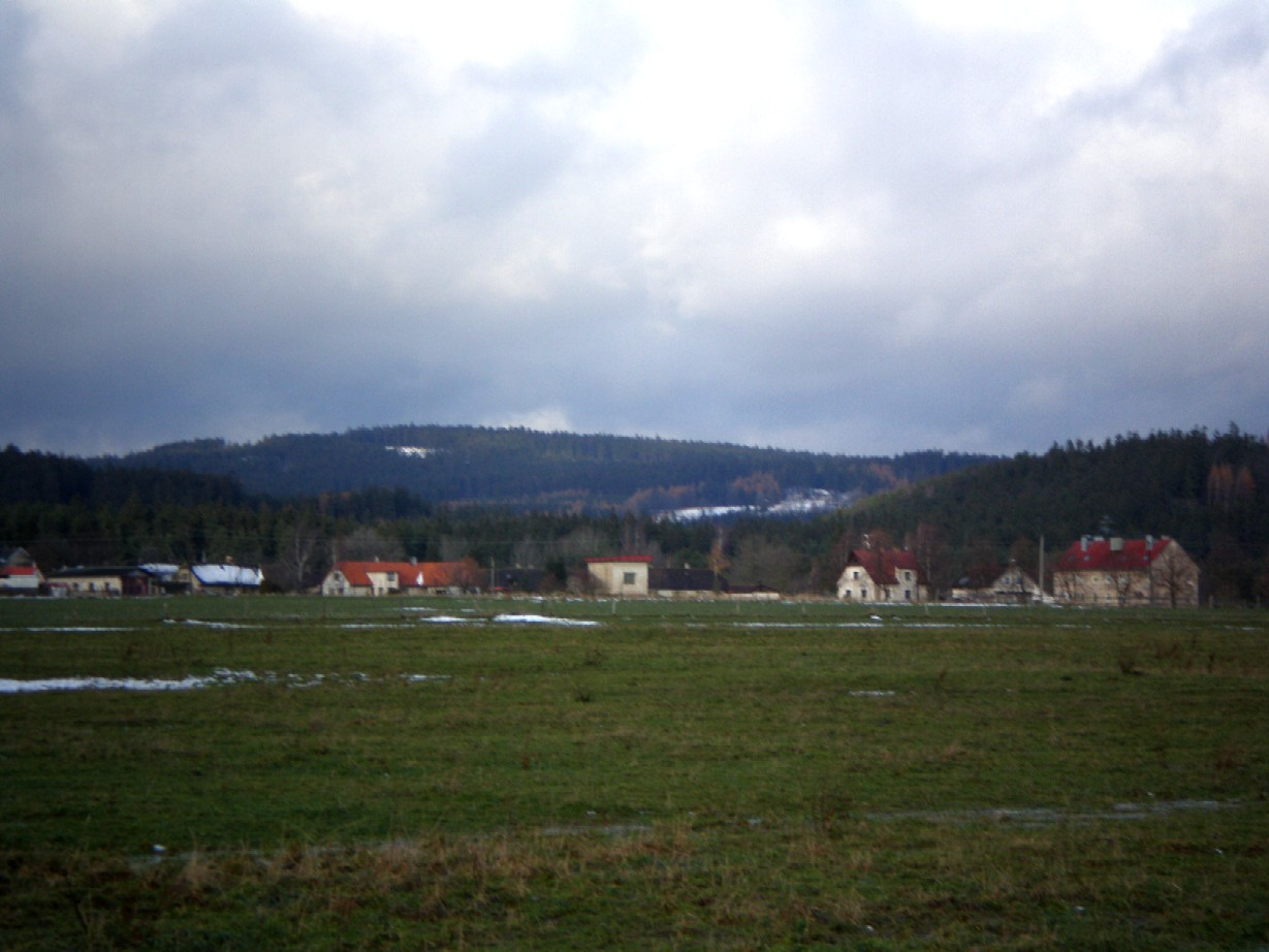 Nad obcí Láz leží louky v okolí bývalé Skelné Huti a vrch Brdce (839 m)